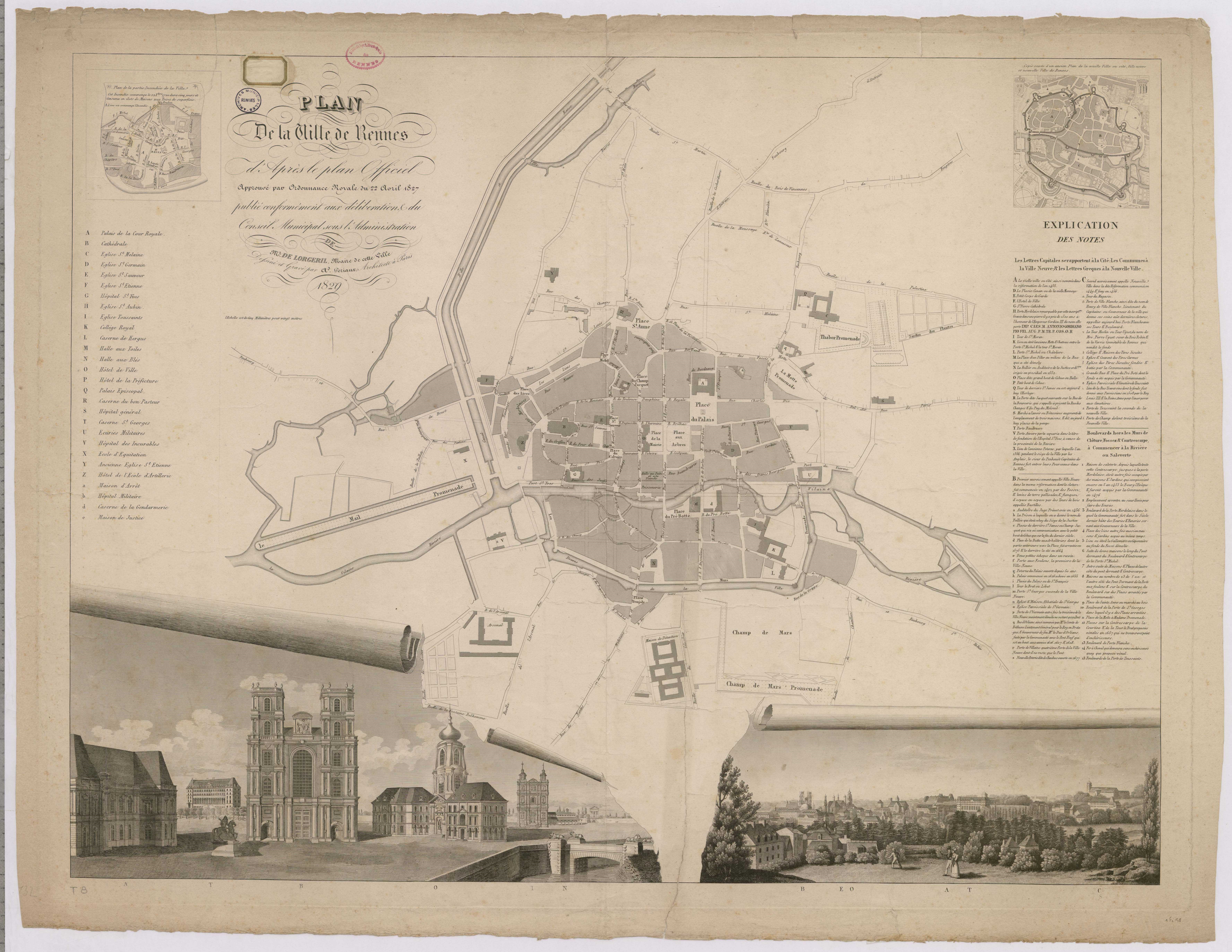 Plan de la ville de Rennes d'après le plan officiel approuvé par ordonnance royale du 22 avril 1827 publié conformément aux délibérations du conseil municipal sous l'administration de Mr de Lorgeril, maire de cette ville. Dessiné et gravé par Ad. Periaux, architecte à Paris.